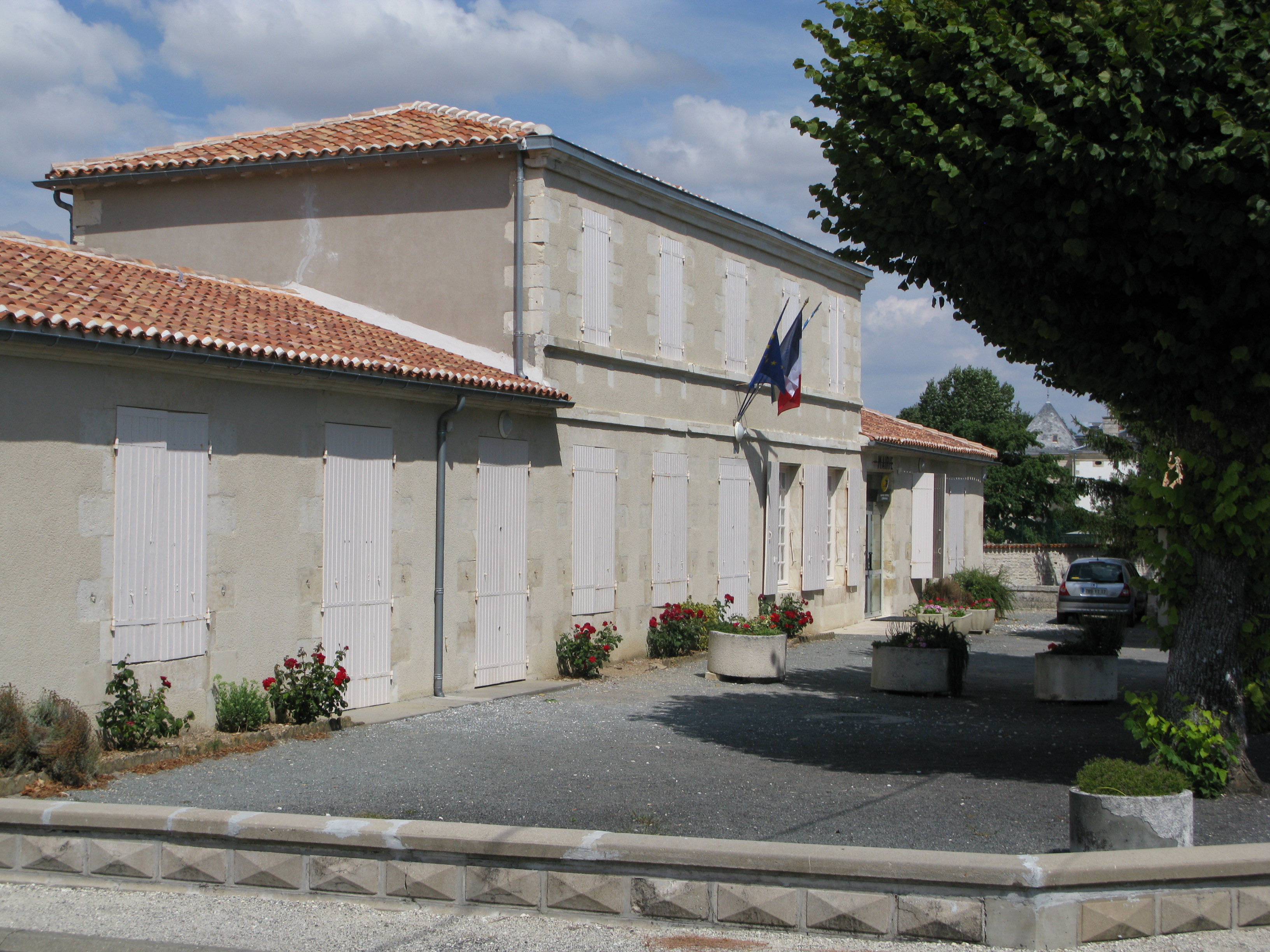 La mairie de Marsais